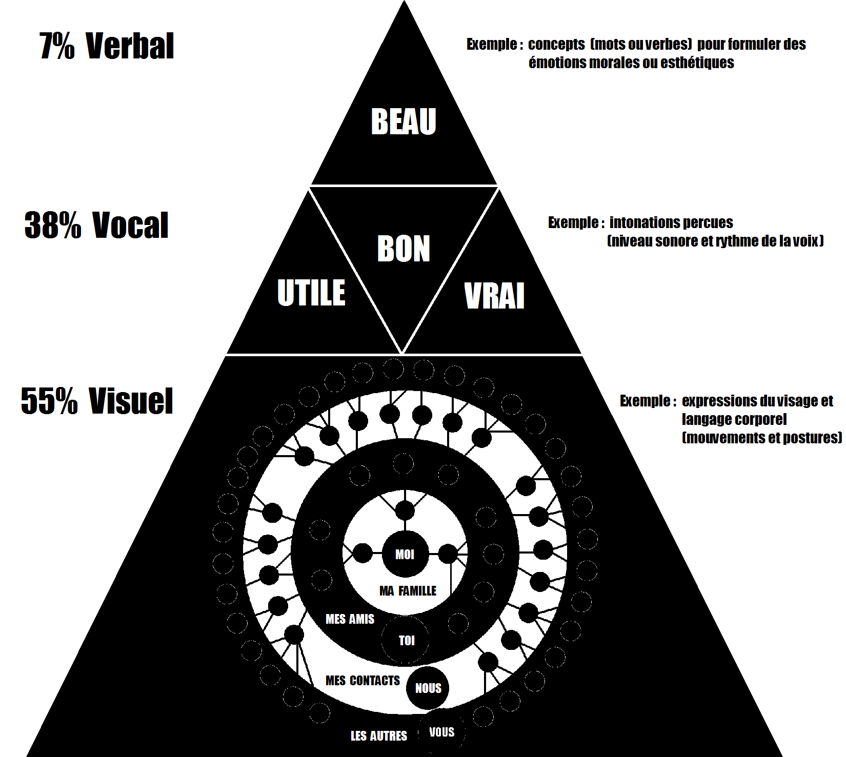 Communauté Mandelbrot